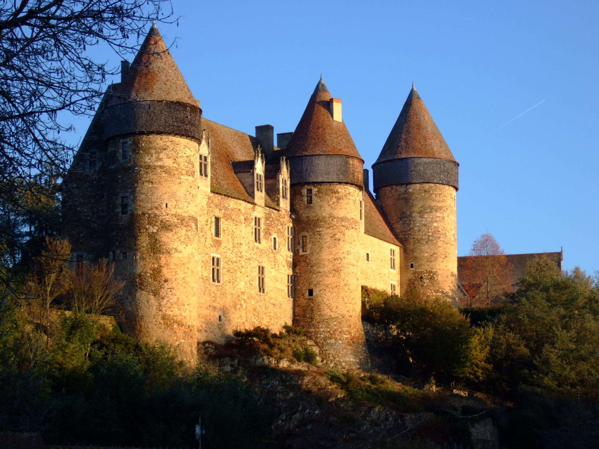 Le château de Culan - Photo amateur prise par moi-même